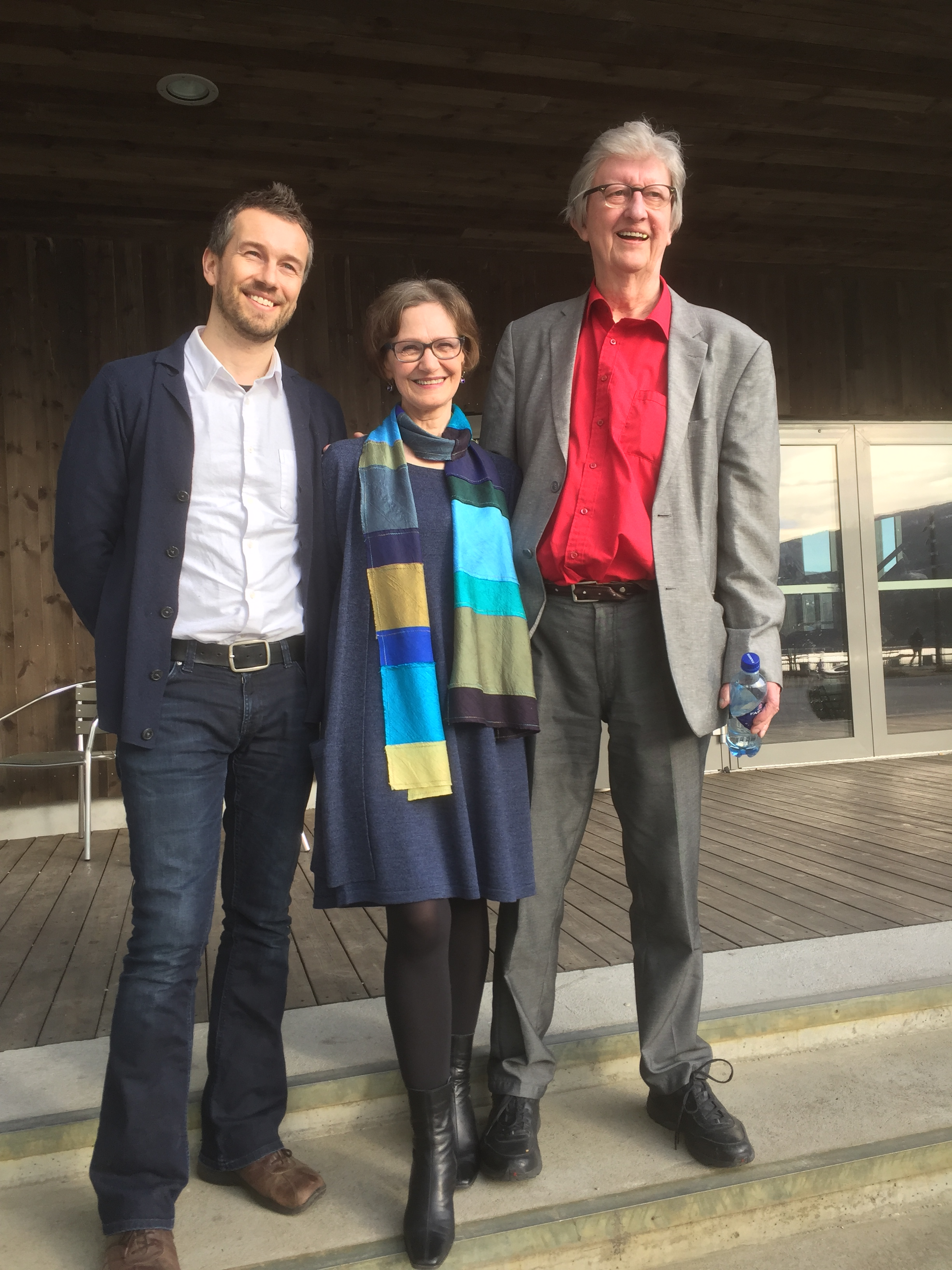 Laila Stian var hovedtema under Herbjørnsruddagene 2017 på Notodden. Hun ble intervjuet av forfatteren Bjarte Breiteig (t.v.). Til høyre: Hans Herbjørnsrud